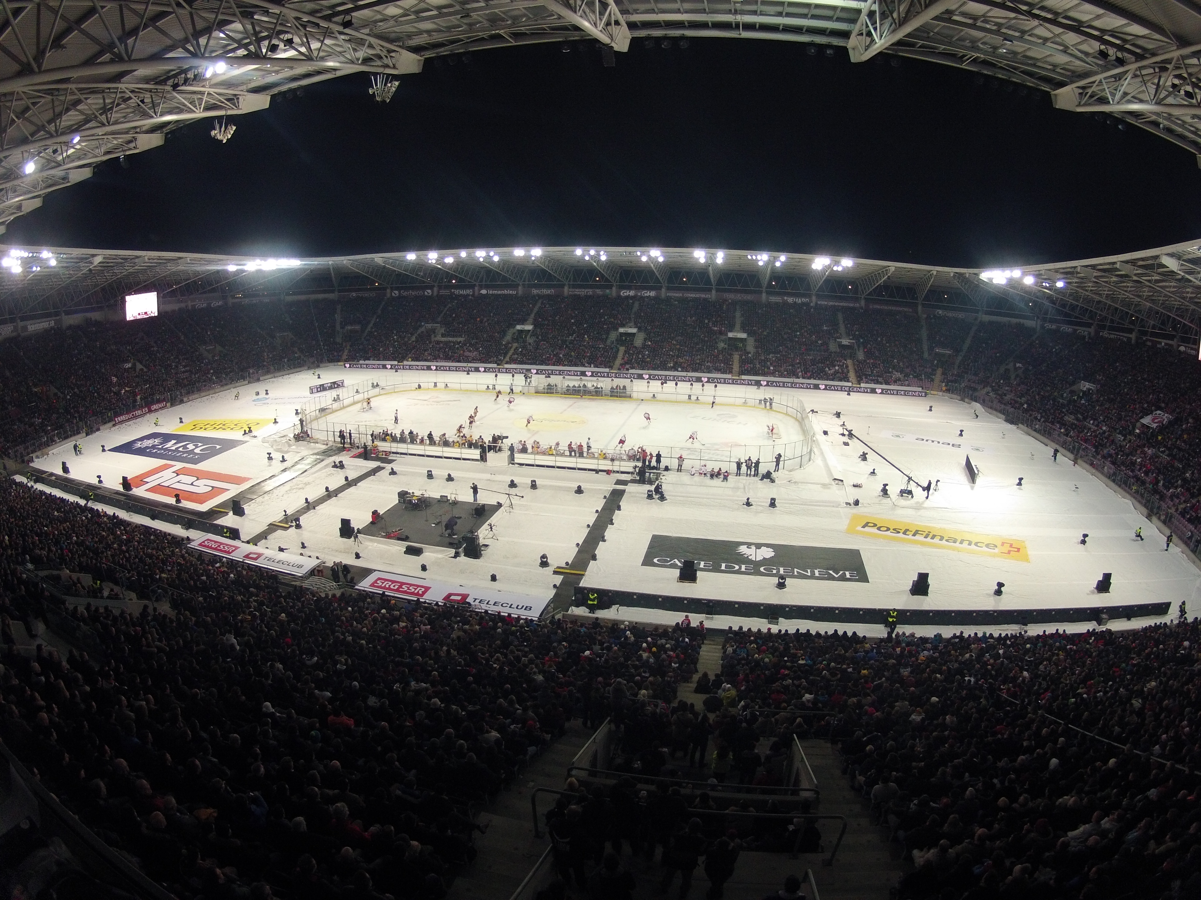 Winter Classic - GSHC-LHC - 20140111 - Stade de Genève